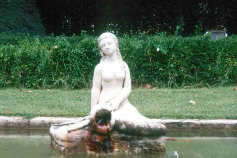 Fuente de la sirena en el Parque de los Campos Elíseos de Lleida.